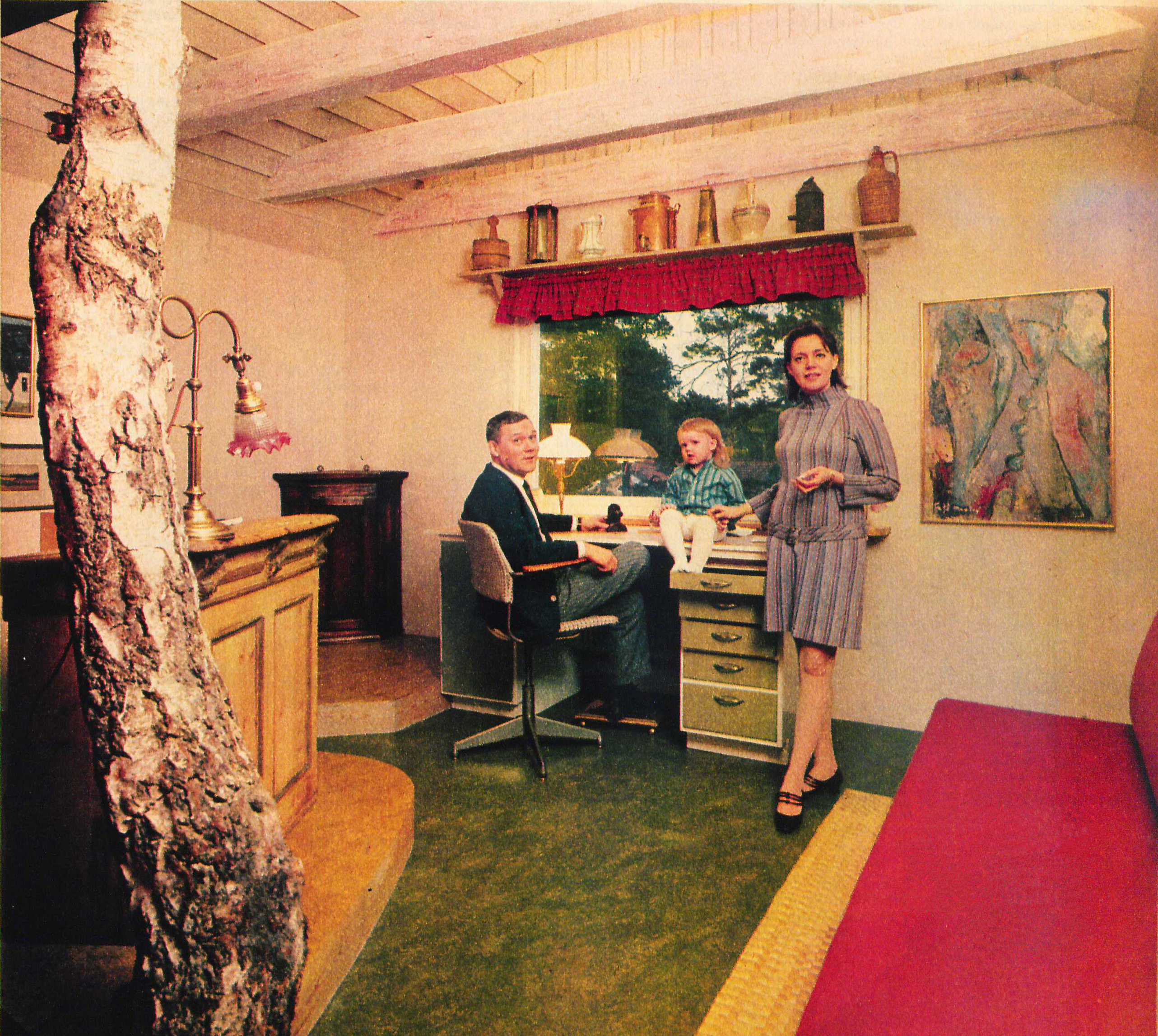 Olof Thunberg, Amanda Thunberg och Mona Andersson i sitt hem på Värmdö.